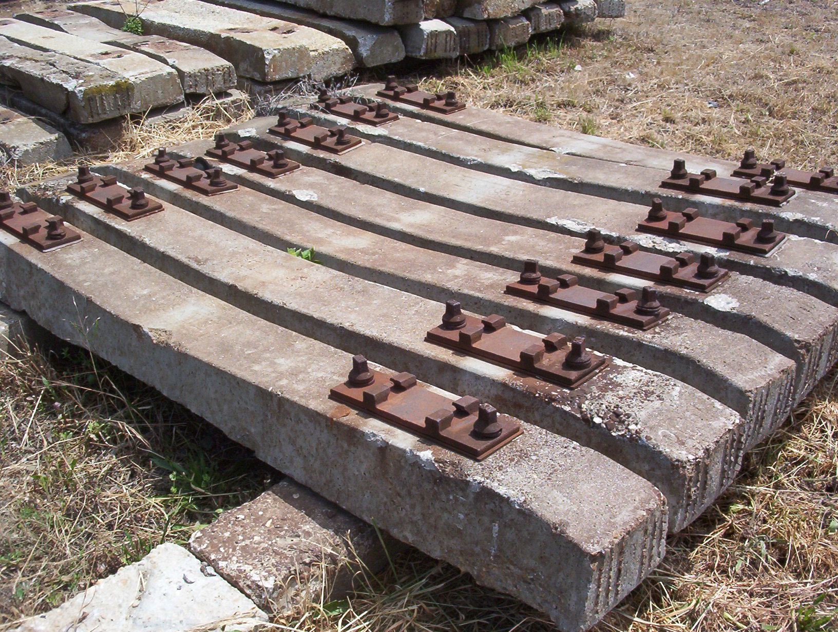 Deponált "LM" jelű vasbetonaljak (Soroksár)